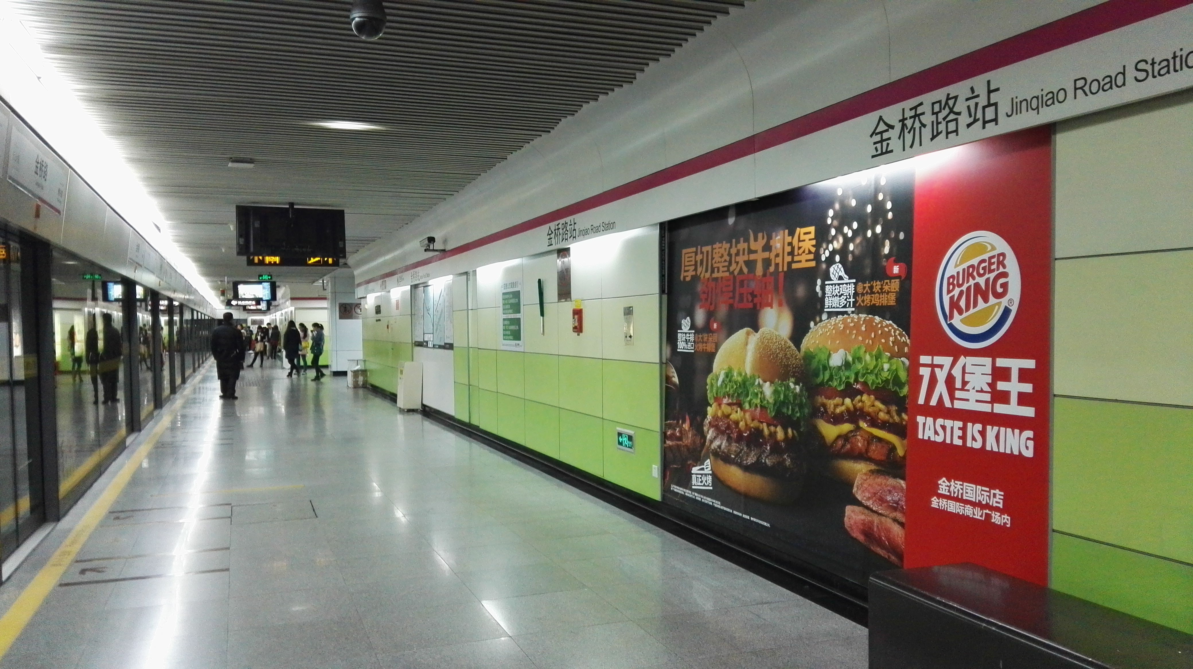 金桥路站港城路方向站台